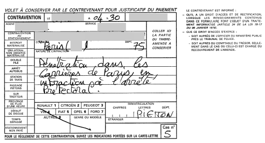 contravention suite à la circulation interdite d'un piéton dans les catacombes de paris